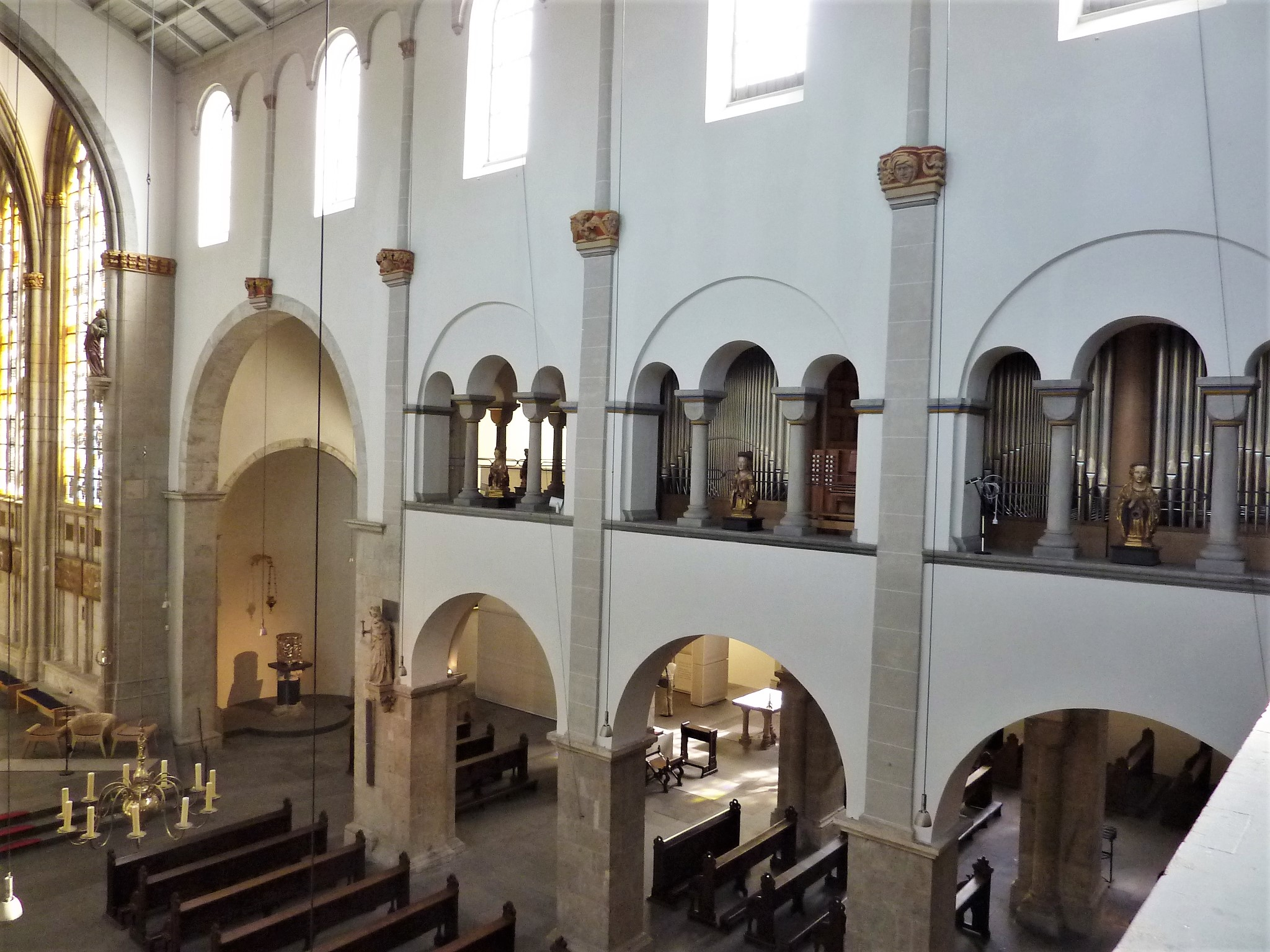 Basilika St. Ursula Köln